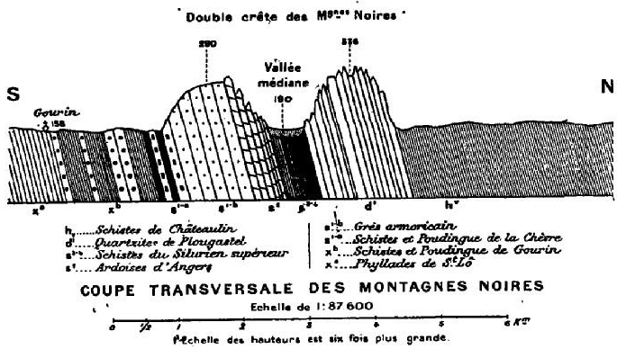 Coupe transversale des Montagnes Noires, par L. Gallouédec (Annales de Géographie, 1893)